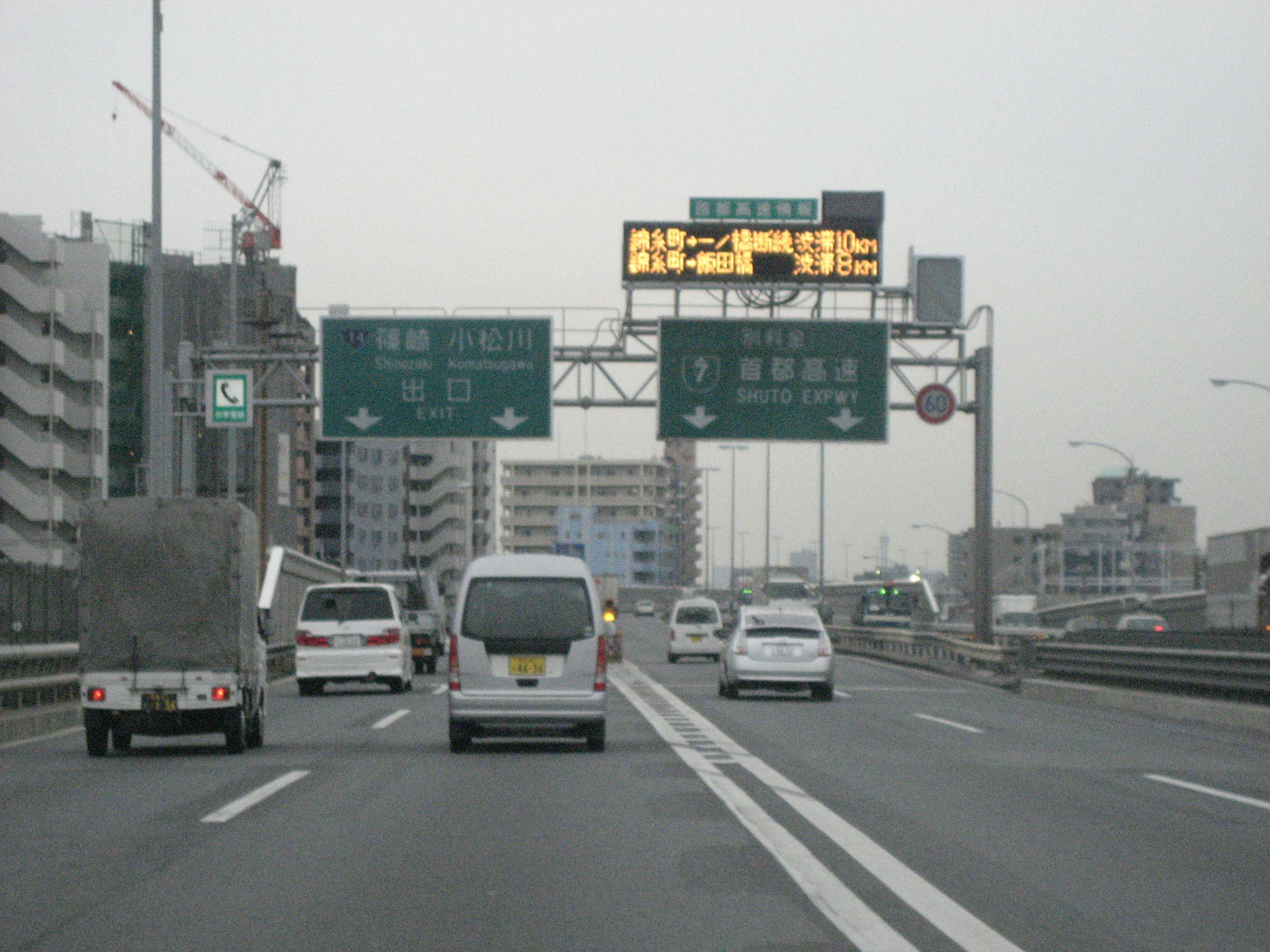 篠崎インター